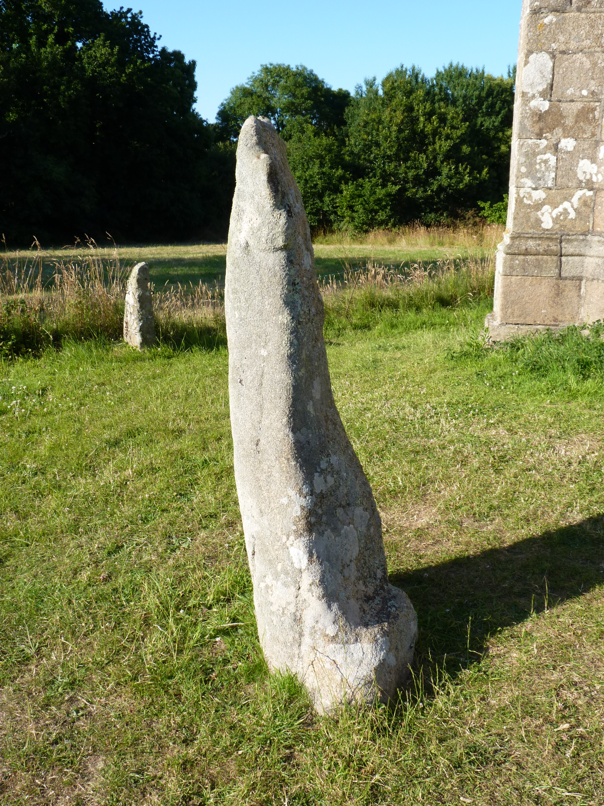 menhir situé devant l'entrée de la chapelle.